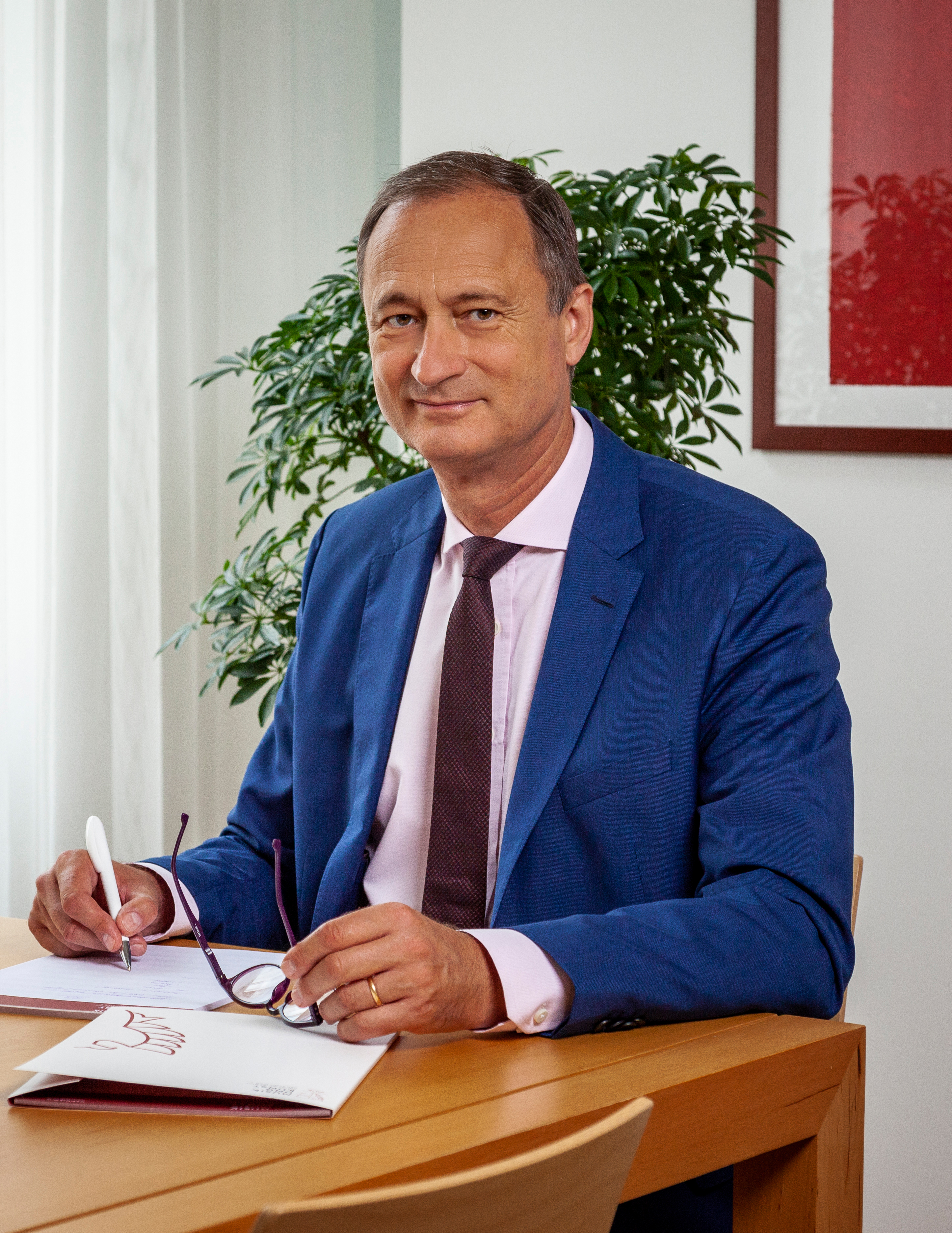 Rektor Andreas Mailath-Pokorny (c) Stephan Doleschal